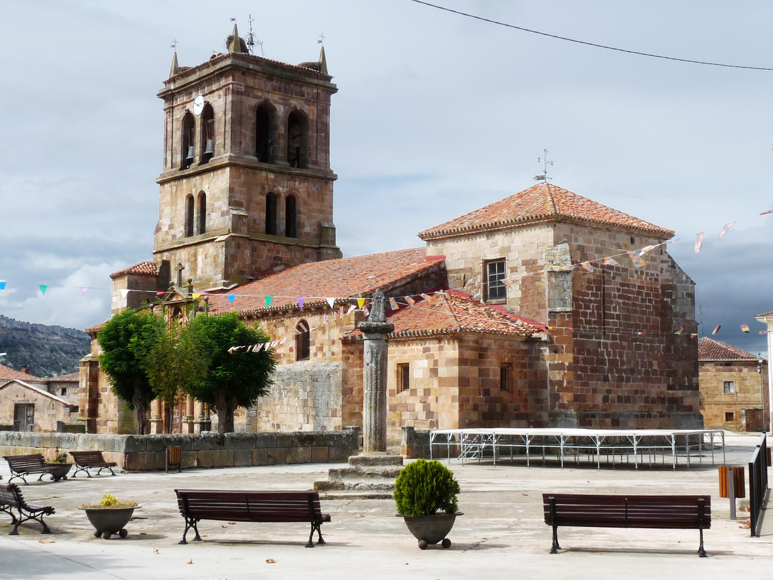 Barbadillo del Mercado - Iglesia de San Pedro (s. XVII)